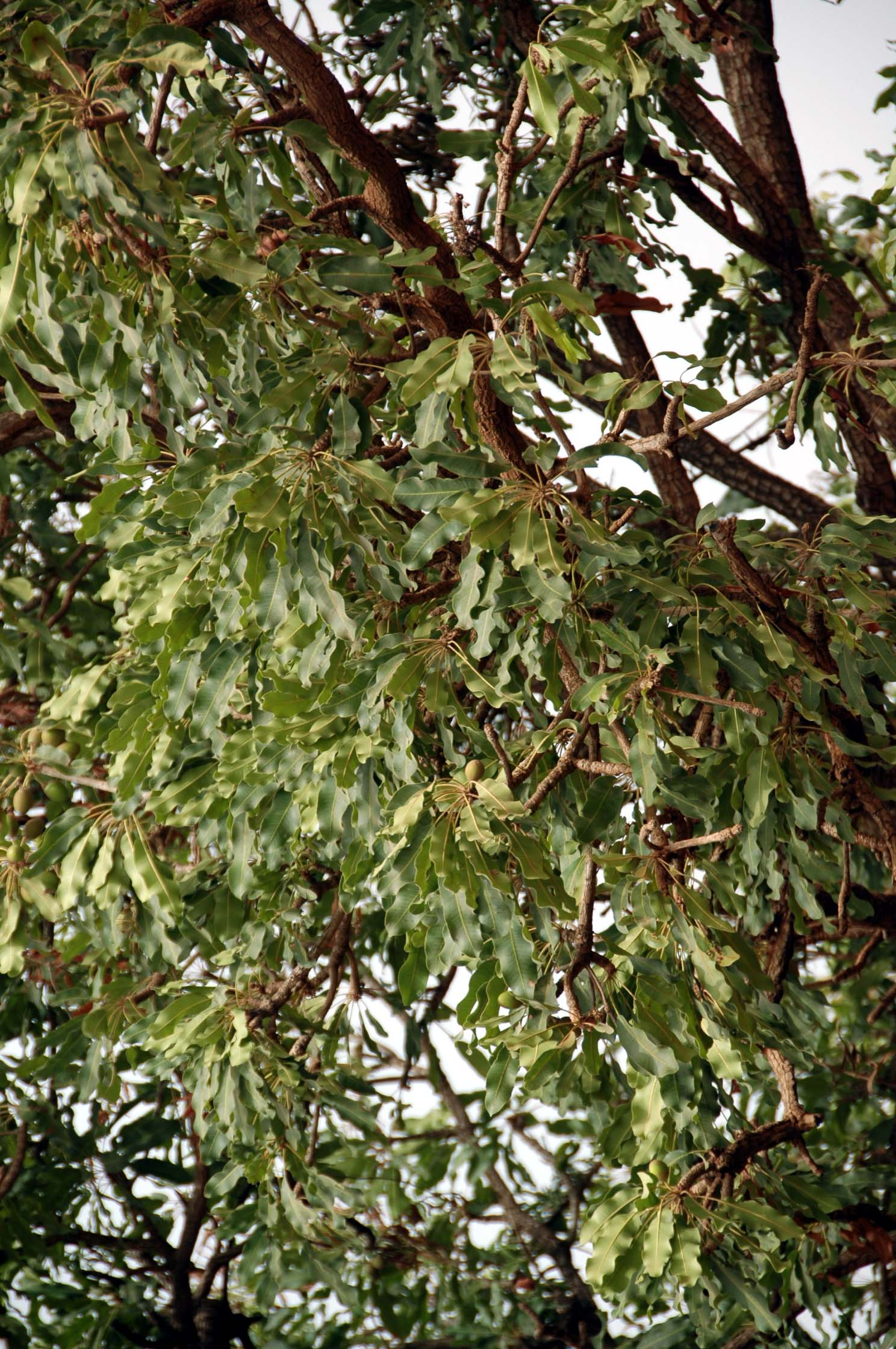 Fotografía de un árbol de Karité tomada en Burkina Faso en el mes de febrero de 2007 Árbol de karité de Burkina Faso